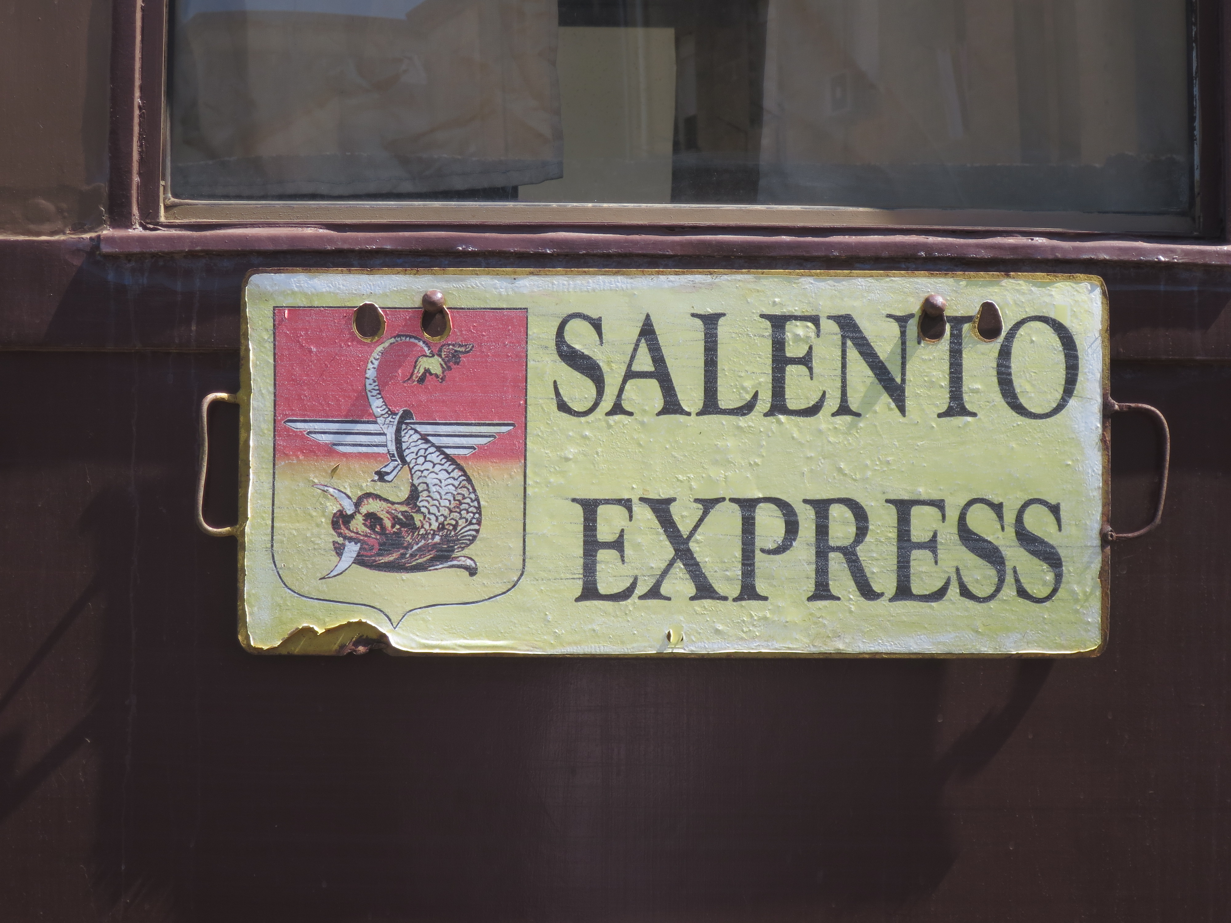 Salento Express